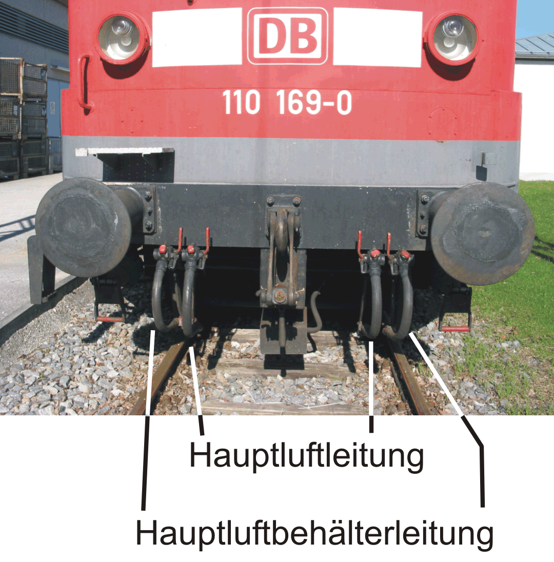 Stirnfläche einer elektrischen Lokomotive der BR 110 mit Hauptluft- und Hauptluftbehälterleitung